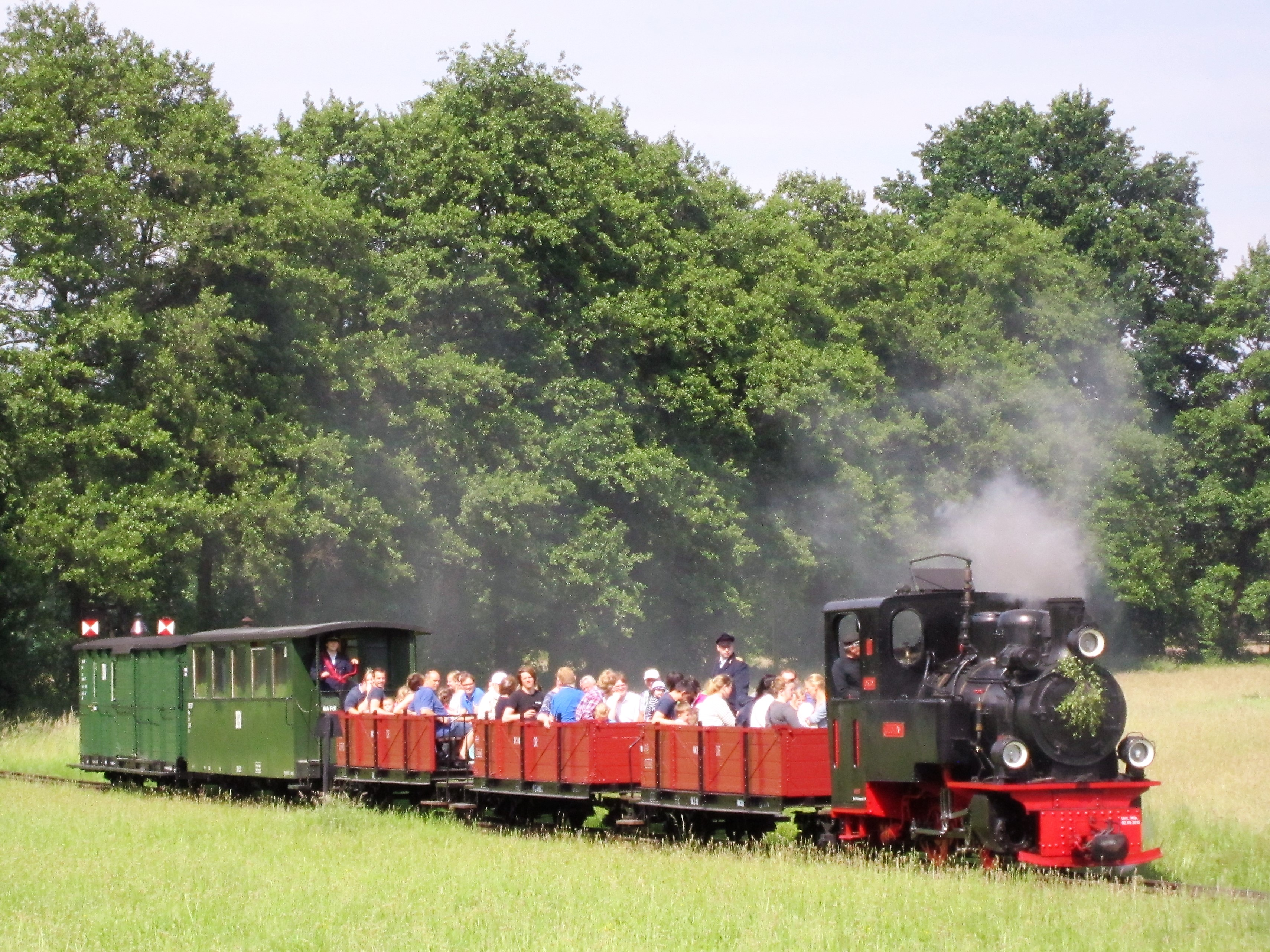 Dampf-Kleinbahn Mühlenstroth (Gütersloh), Lok "Gustav"